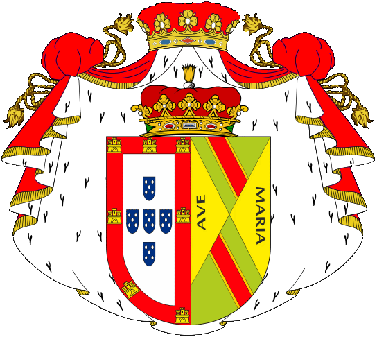 Armas de los Duques de Loulé